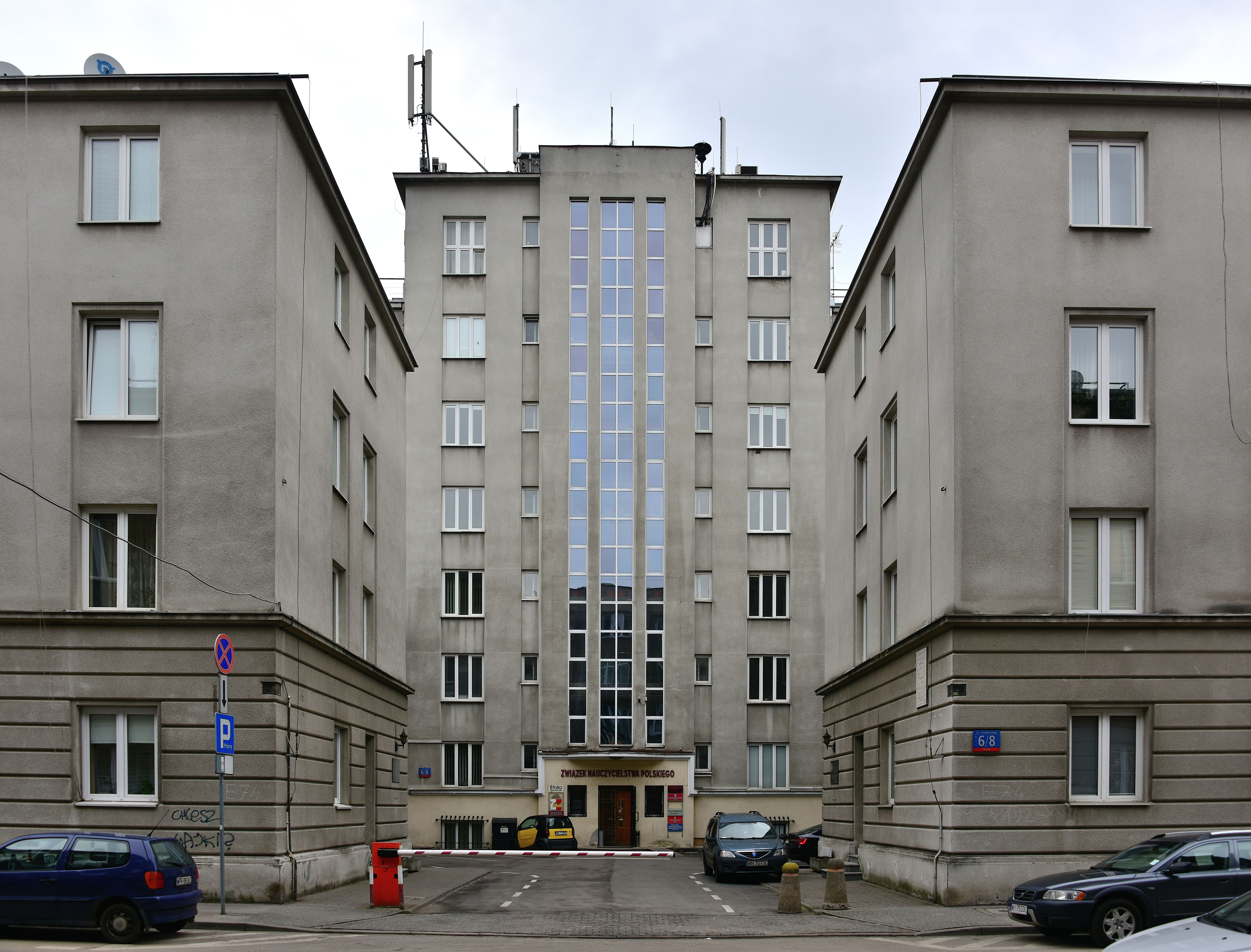 Siedziba Związku Nauczycielstwa Polskiego w Warszawie (od striony ul. Smulikowskiego)